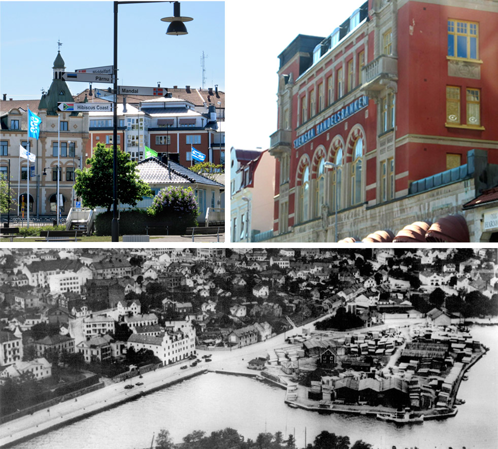 Collage med bilder över Oskarshamn. Övre vänster: Vy från Brädholmen mot Skeppsbron. Övre höger: Svenska Handelsbankens byggnad på Lilla torget. Nedre: Flygfoto över hamnområdet 1930-tal.